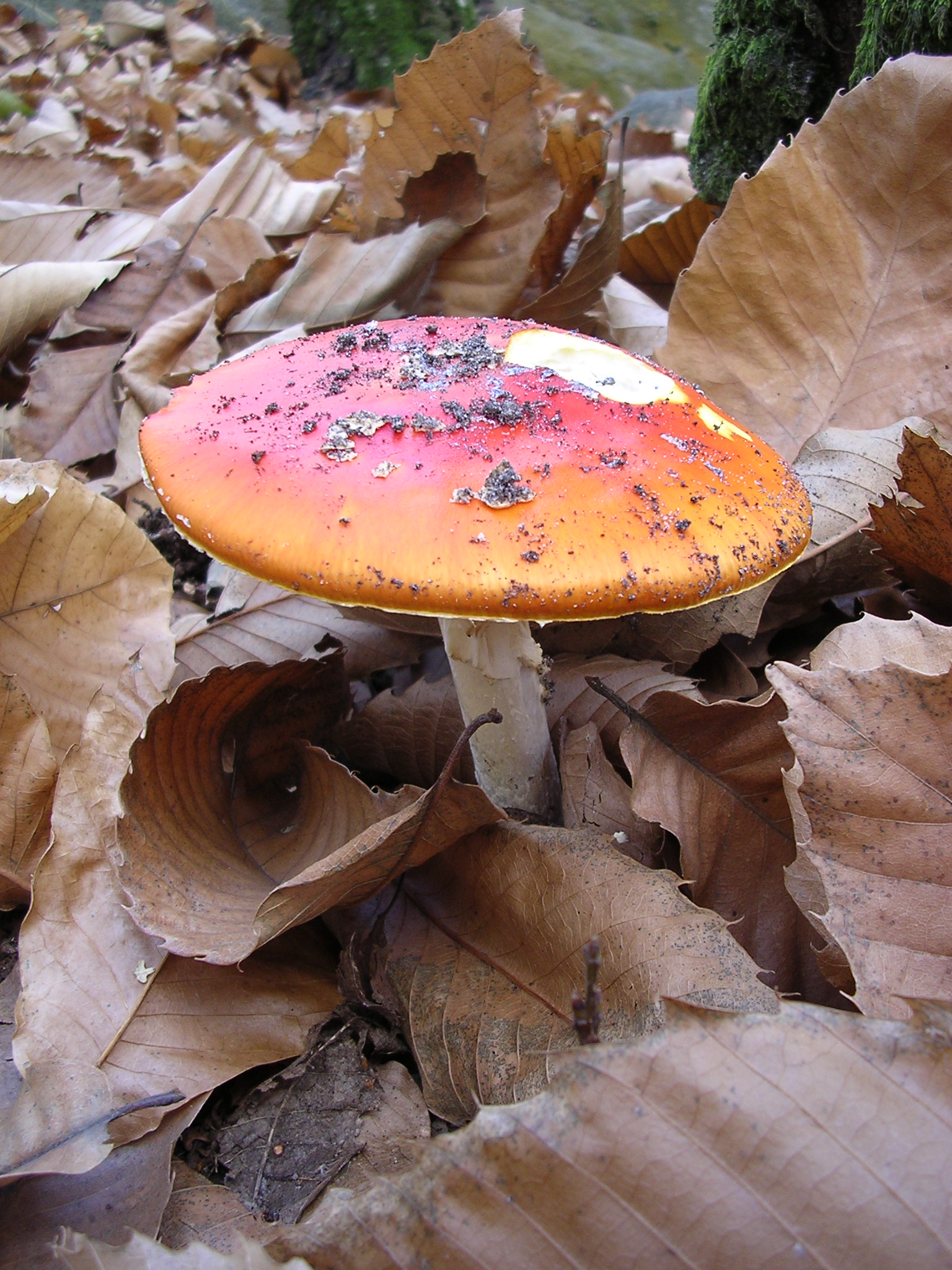 Amanite tue-mouches, prise le 01/11/2005 dans la forêt de Chamarande (91)